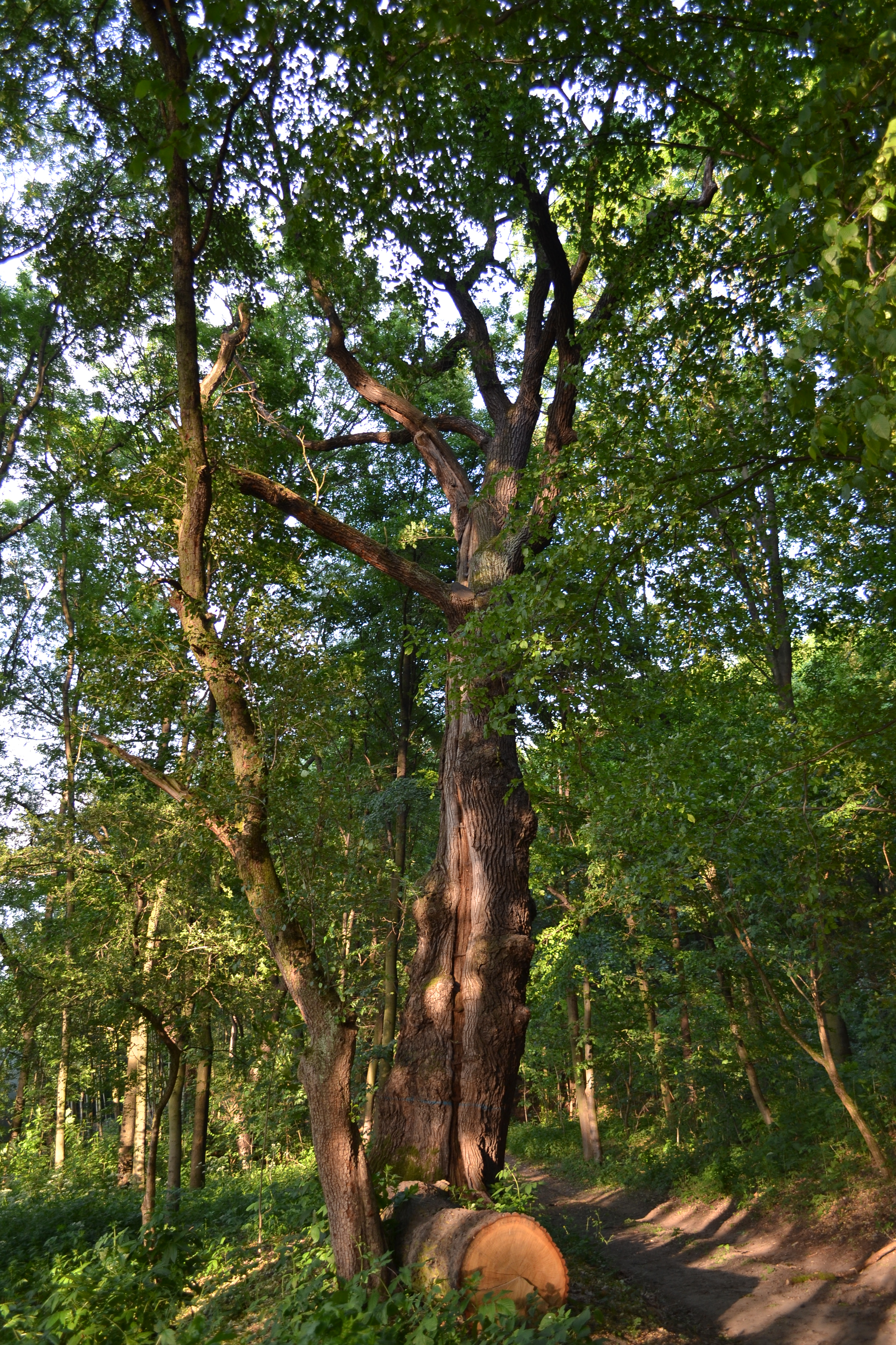 Druhý ze skupiny památných dubů letních (Quercus robur) v parku Cibulka, Košíře, Praha 5. Unknown one of a group of three famous english oaks (quercus robur) in park cibulka in prague, czech republic.